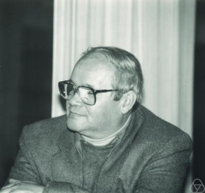 Janos Galambos